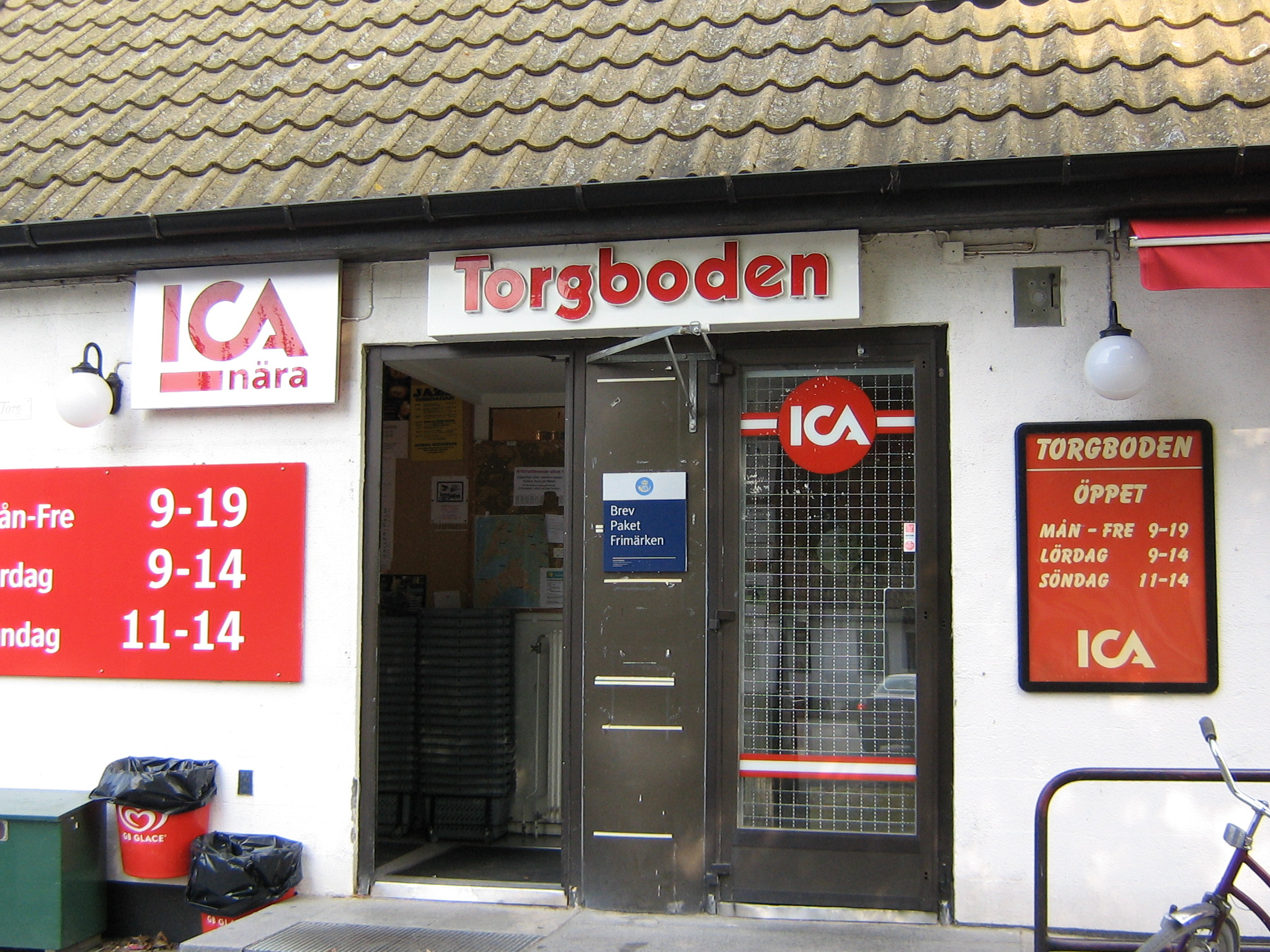 På Gamla torget ligger denna ICA-butik.